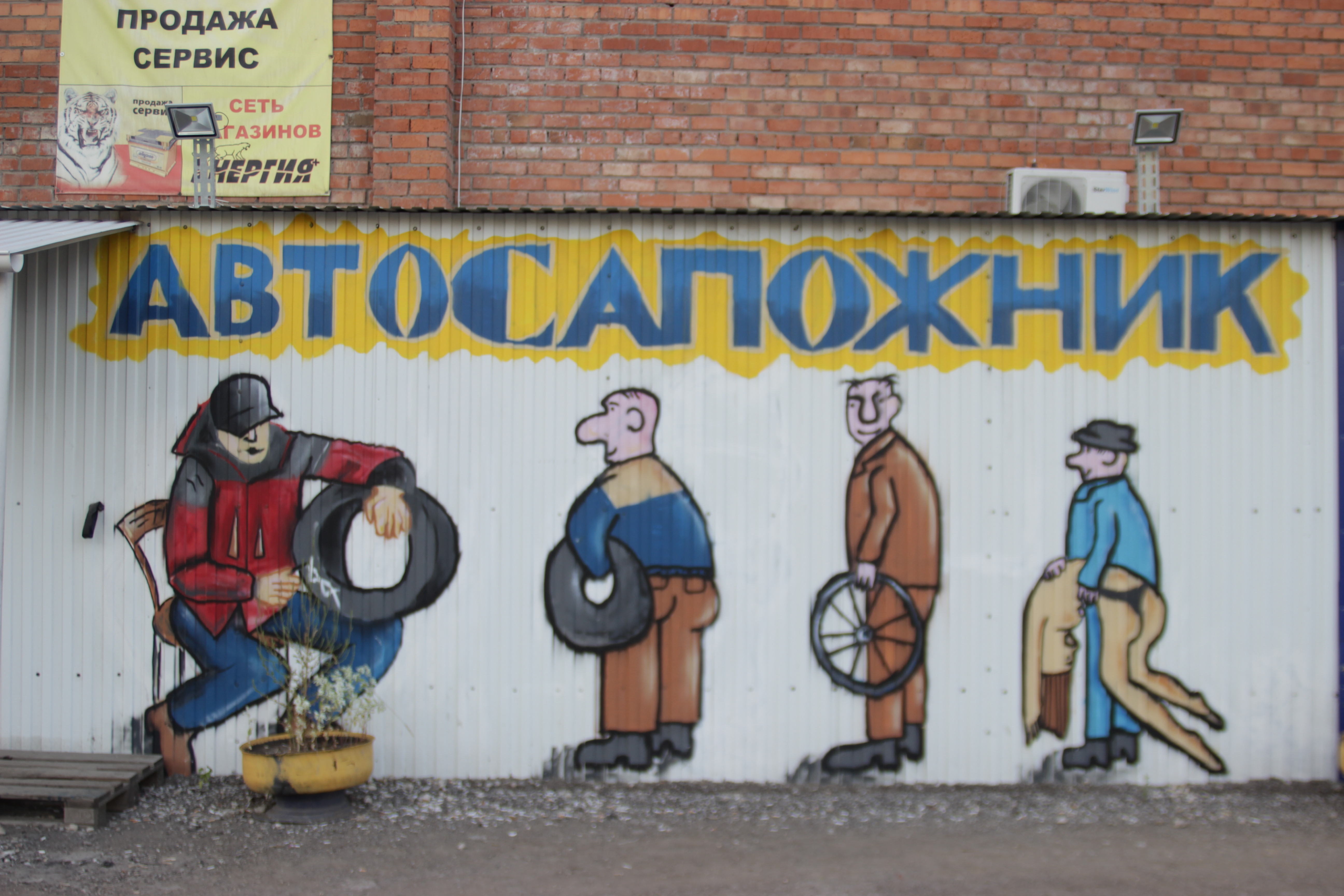 Реклама услуга гаражного мастера